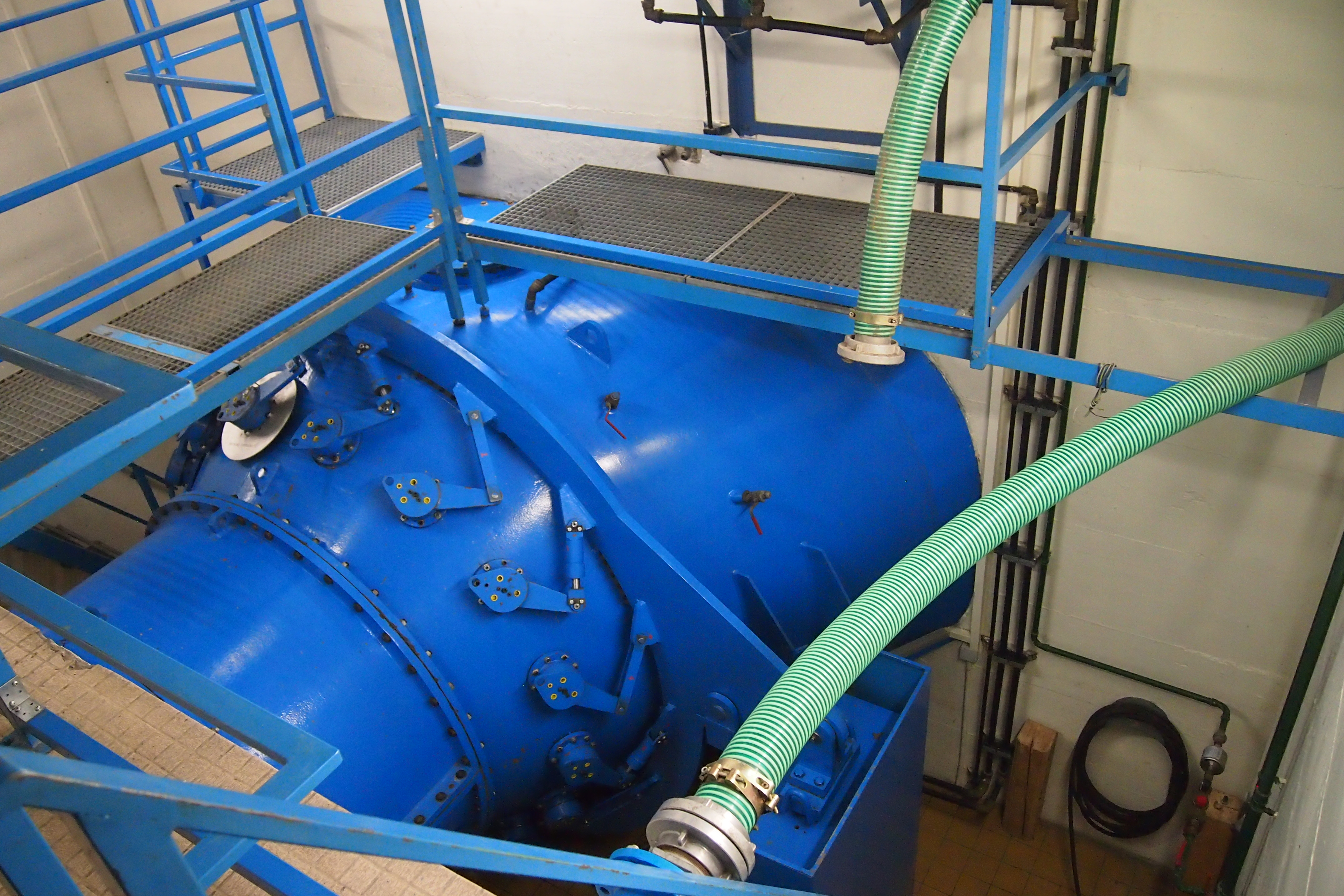 Turbine mit Leitwerk des neuen Maschinensatzes